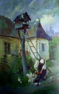 «Падворак. Жанчына, якая корміць птушак», да 1910 г. Мастацкі музей імя М. Чурлёніса. Коўна.